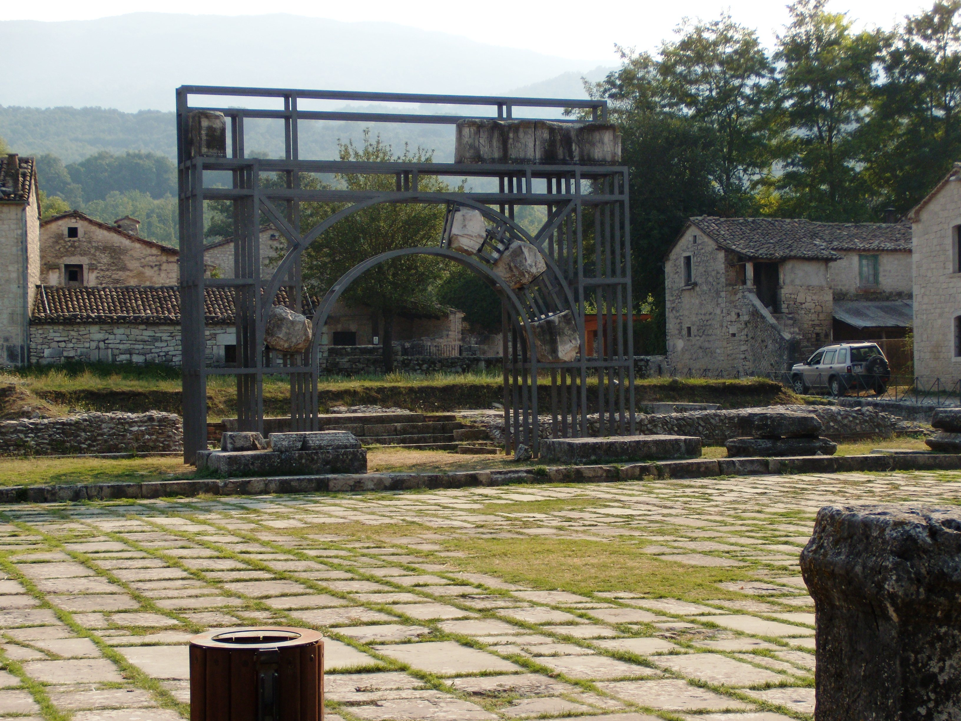 Scavi archeologici di Saepinum (Italy): Foro(epoca romana).